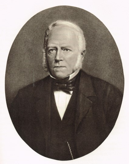 Scan (22.11.2019)